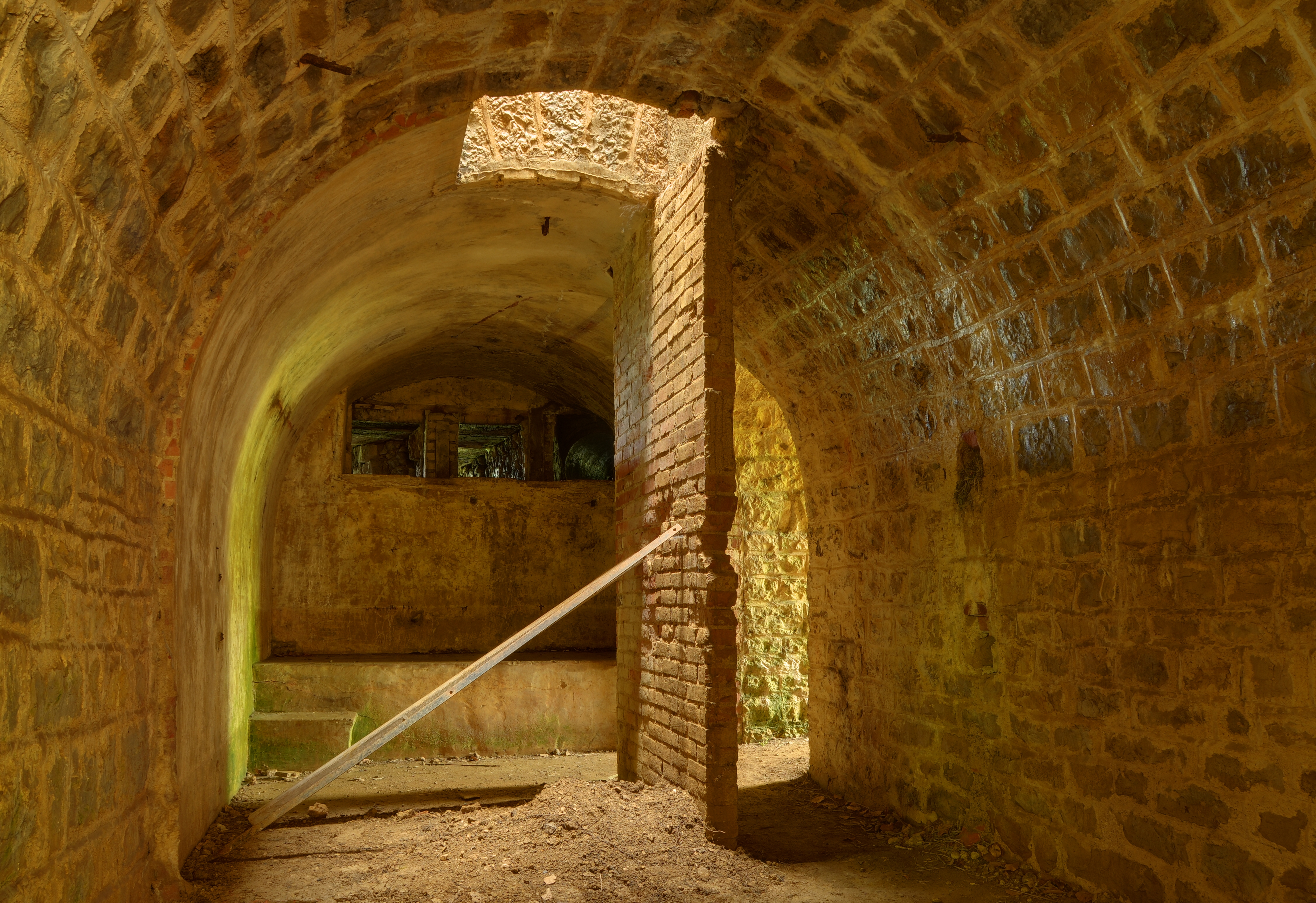 Poste optique Nord. Bart hill fortifications (HDR).